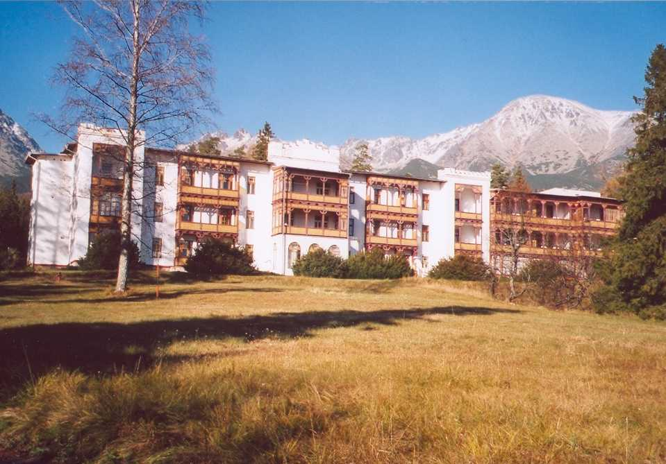 Kategória:Obrázky budov Kategória:Presunúť na Commons